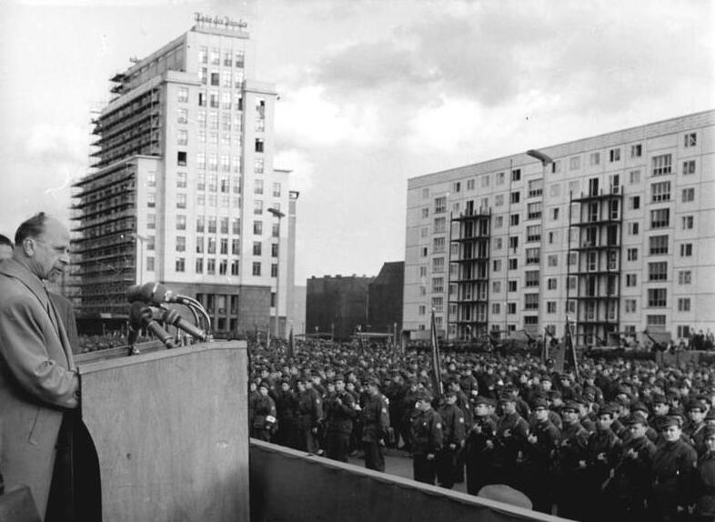 Zentralbild-Kollektiv, 23.8.1961 Feierlicher Appell der Berliner Kampfgruppen. Die Bürger der Hauptstadt und mit ihnen führende Vertreter der Partei der Arbeiterklasse statteten am 23.8.1961 auf einem Appell der Berliner Kampfgruppen den Angehörigen der Arbeiterbataillone den Dank von Millionen Bürgern der DDR für ihre Einsatzbereitschaft ab. Die Kämpfer in den steingrauen Uniformen waren im Herzen der Hauptstadt, auf der Großbaustelle zwischen dem Strausberger Platz und dem Alex, unter den roten Fahnen der Arbeiterklasse aufmarschiert, als der Erste Sekretär des ZK der SED und Vorsitzenden des Staatsrats der DDR, Walter Ulbricht, zur Teilnahme an dem Appell in der Karl-Marx-Allee eintraf. UBz: Walter Ulbricht spricht zu den Kampfgruppeneinheiten.